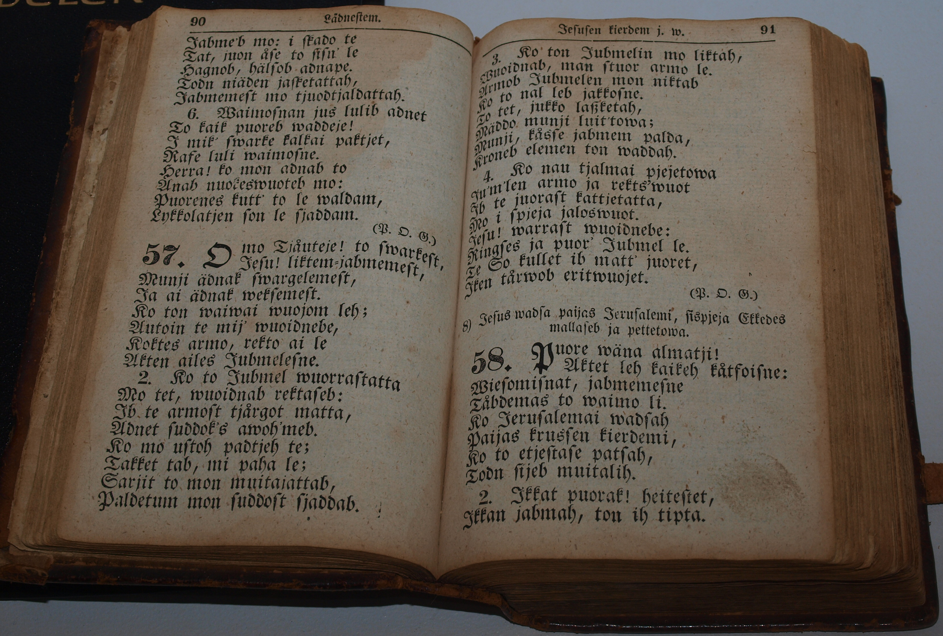 Lulesamisk salmebok — anten Same tjåggolwasen psalm-kirje : Ailekes- ja passe-peiwi ewangeliumeh ja episteleh : sijen kollekti ja råkkålwasi kum nan ai råkkålwasah kaikasatjah ja aktasatjah ailes ajatasi antest. Lulejon : Hallmana ja Helina, 1895.[1] eller Same tjåggolwasen psalm-kirje : Ailekes ja passe-peiwi evangeliumeh ja episteleh : sijen collecti ja råkkålwasi kum, nan ai råkkålwasah kaikasatjah ja aktasatjah ailes ajatasi antest. Hernösandesne, 1849.[2]